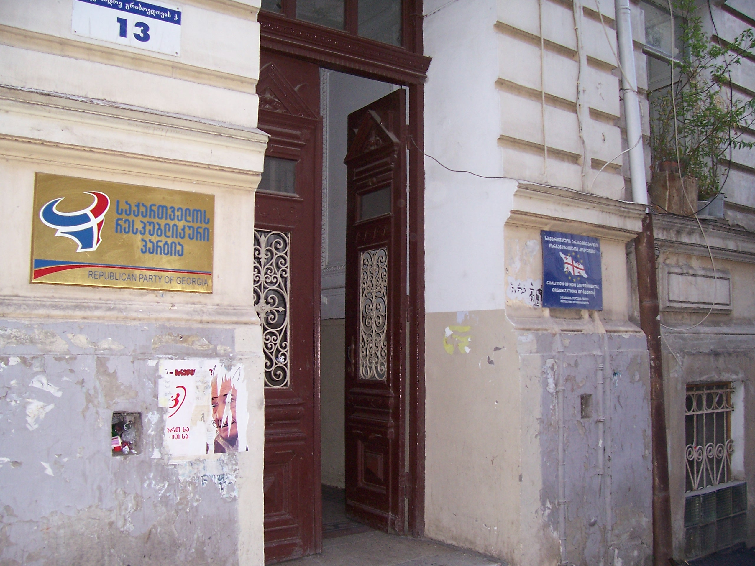 Zentrale der Republikanischen Partei Georgiens